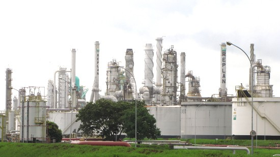 Refinaria de Paulínia.